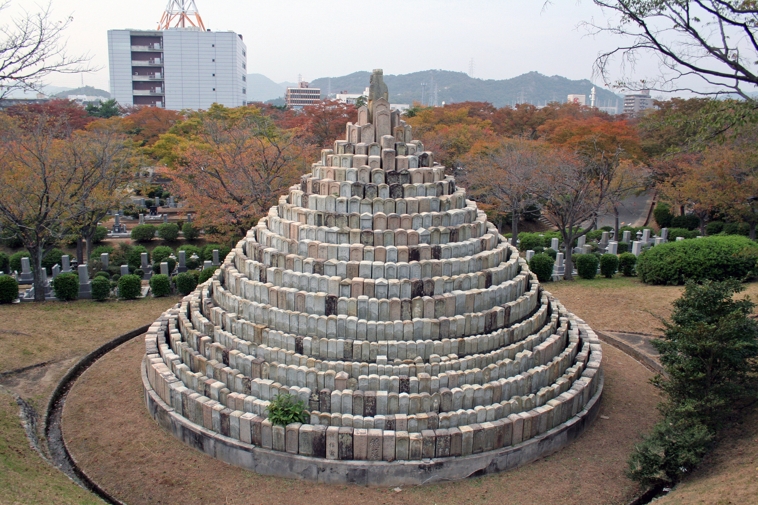 兵庫県姫路市名古山霊苑にある円錐形に積み上げられた無縁仏の墓石群。